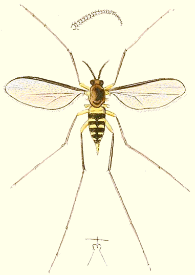 Lasioptera rubi